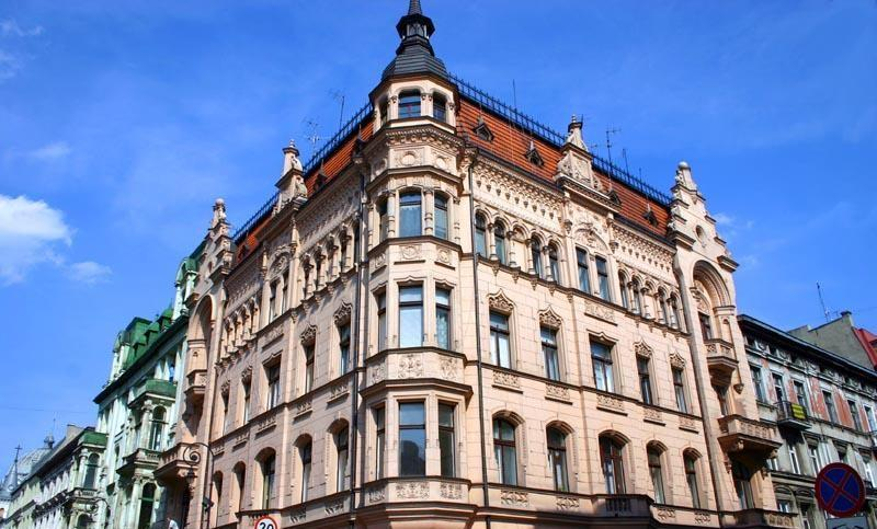 Ulica Piotrkowska, Łódź